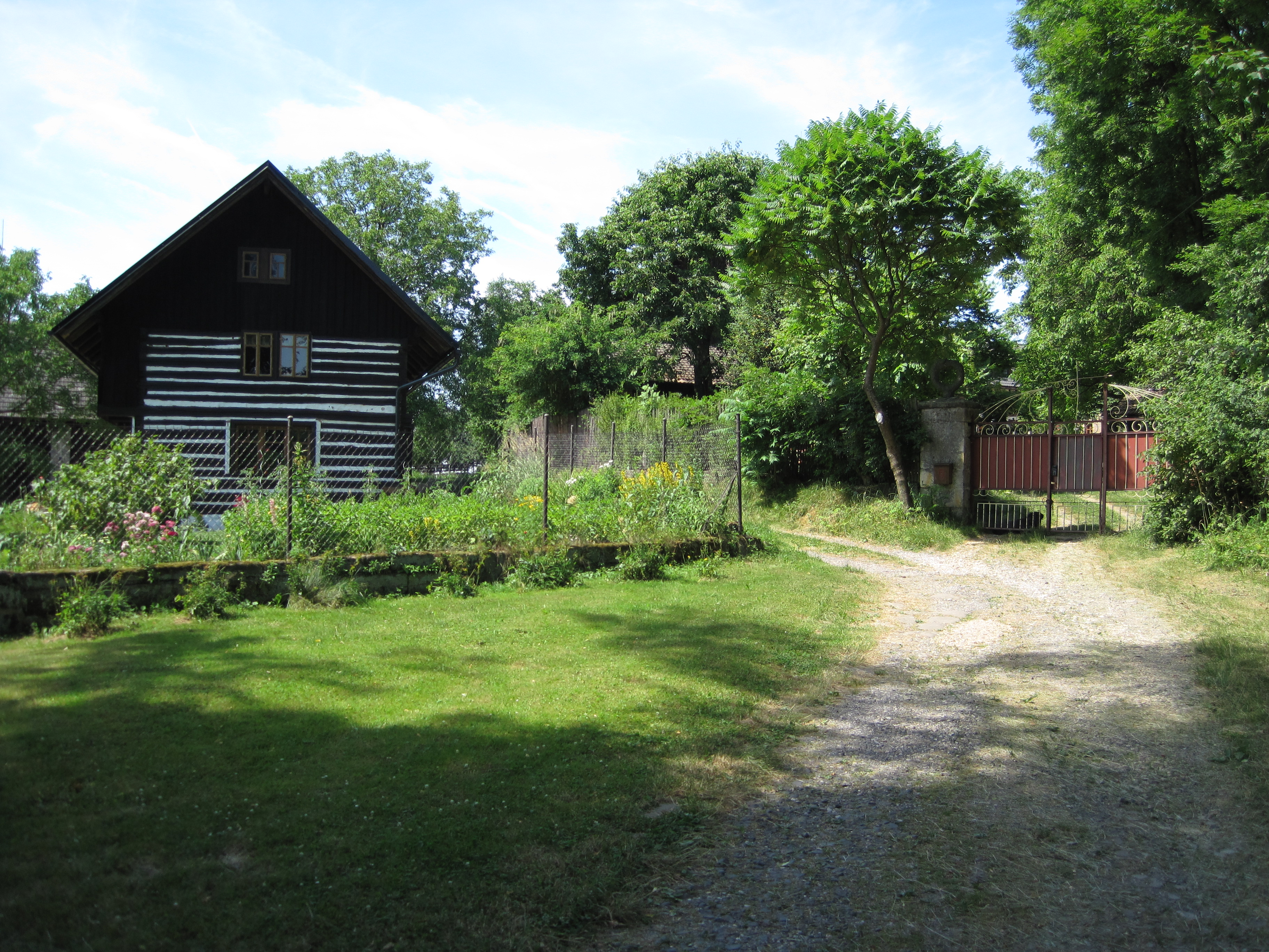 Malá Lhota (v Českém ráji) - chalupy ve středu vsi